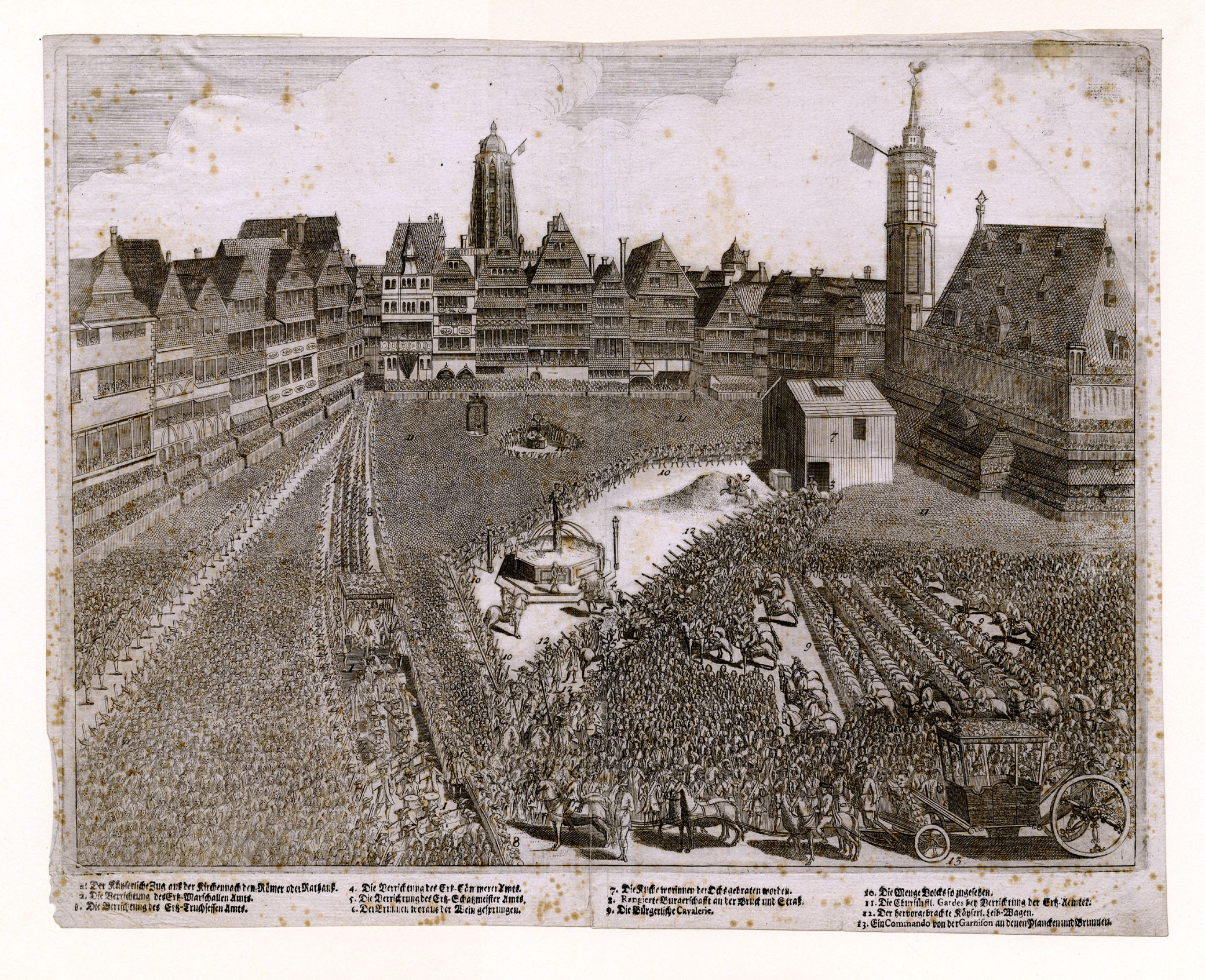 Feierlichkeiten anlässlich der Krönung Karls VI. am 22. Dez. 1711 auf dem Römerberg: Verrichtung der Erzämter